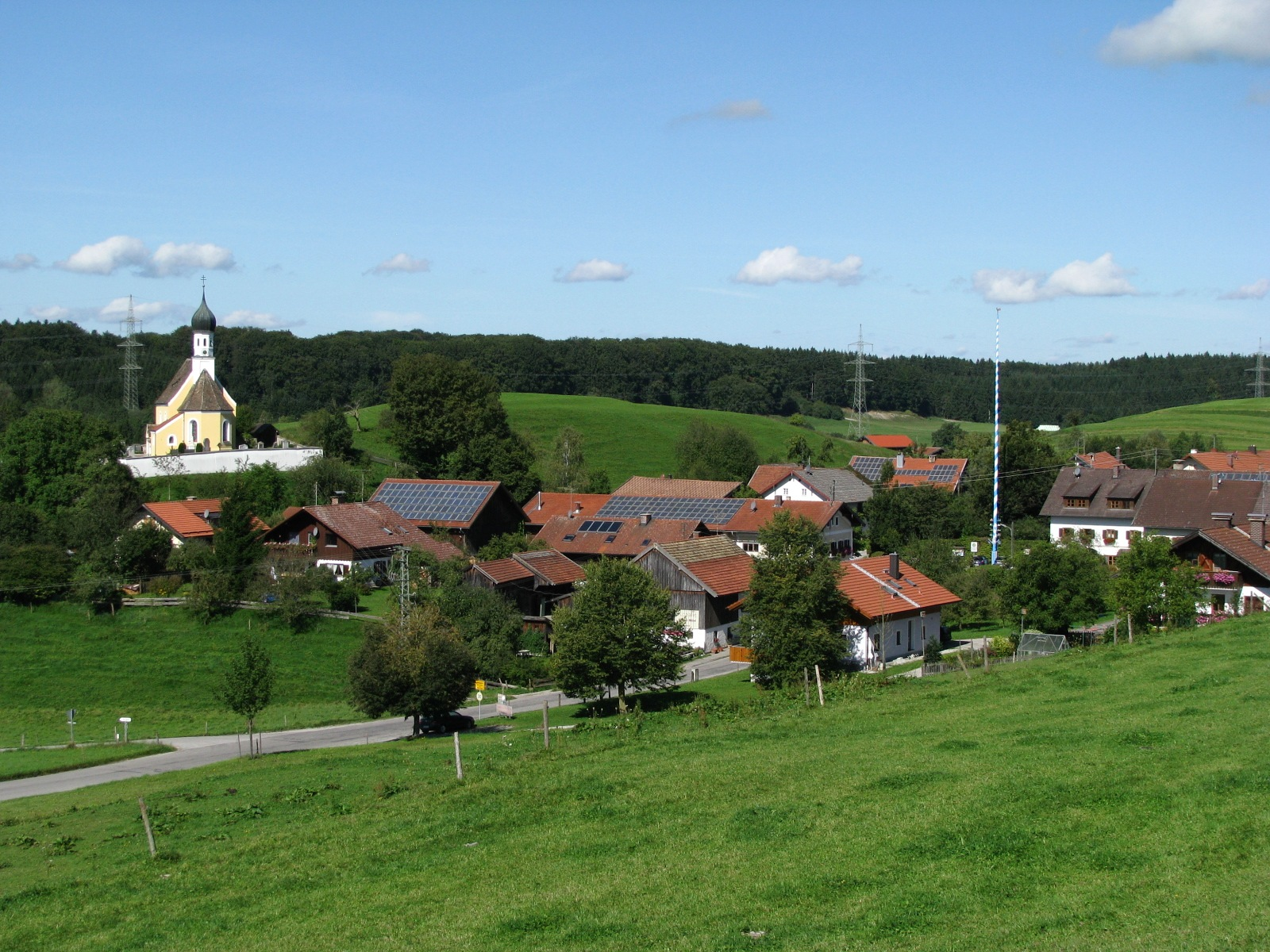 Jenhausen mit der Filialkirche St. Mariä Himmelfahrt aus östlicher Richtung